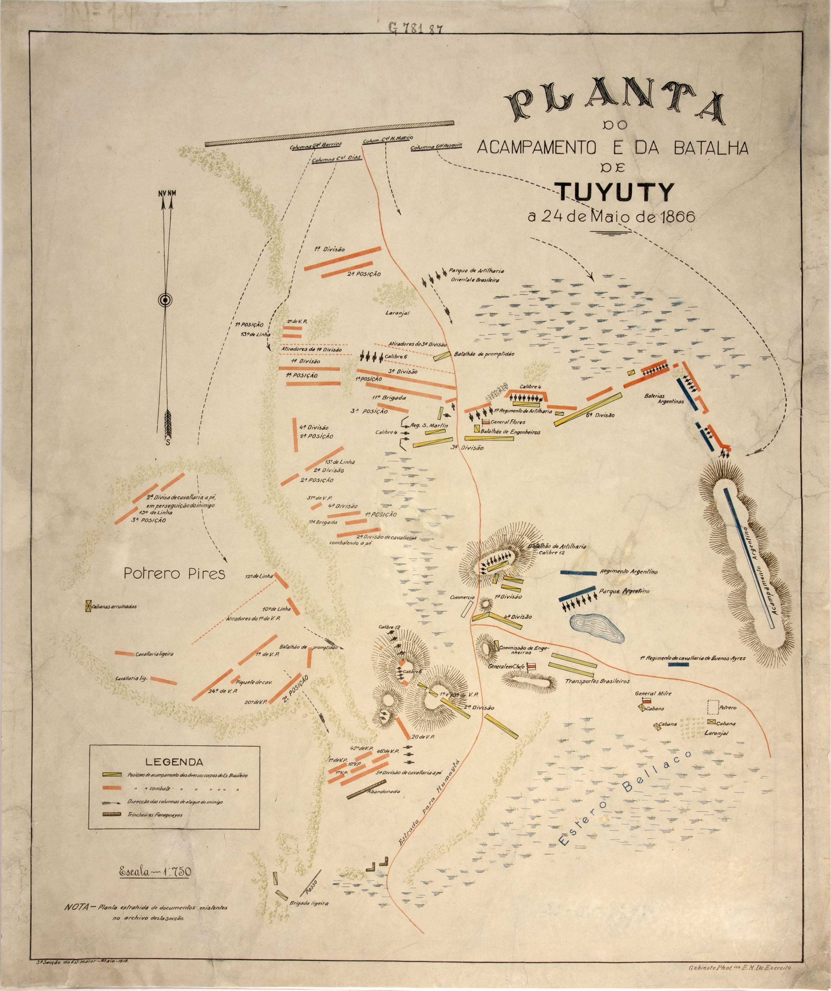 Planta do Acampamento e da Batalha de Tuyuty